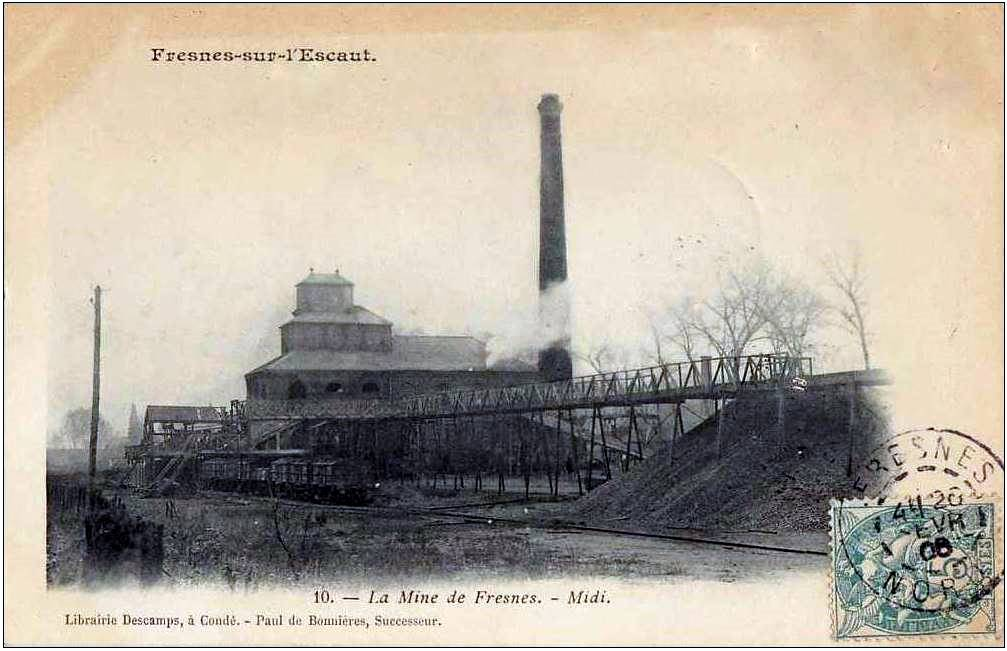 Fosse aujourd'hui disparue implantée jadis sur la commune de Fresnes sur l'Escaut